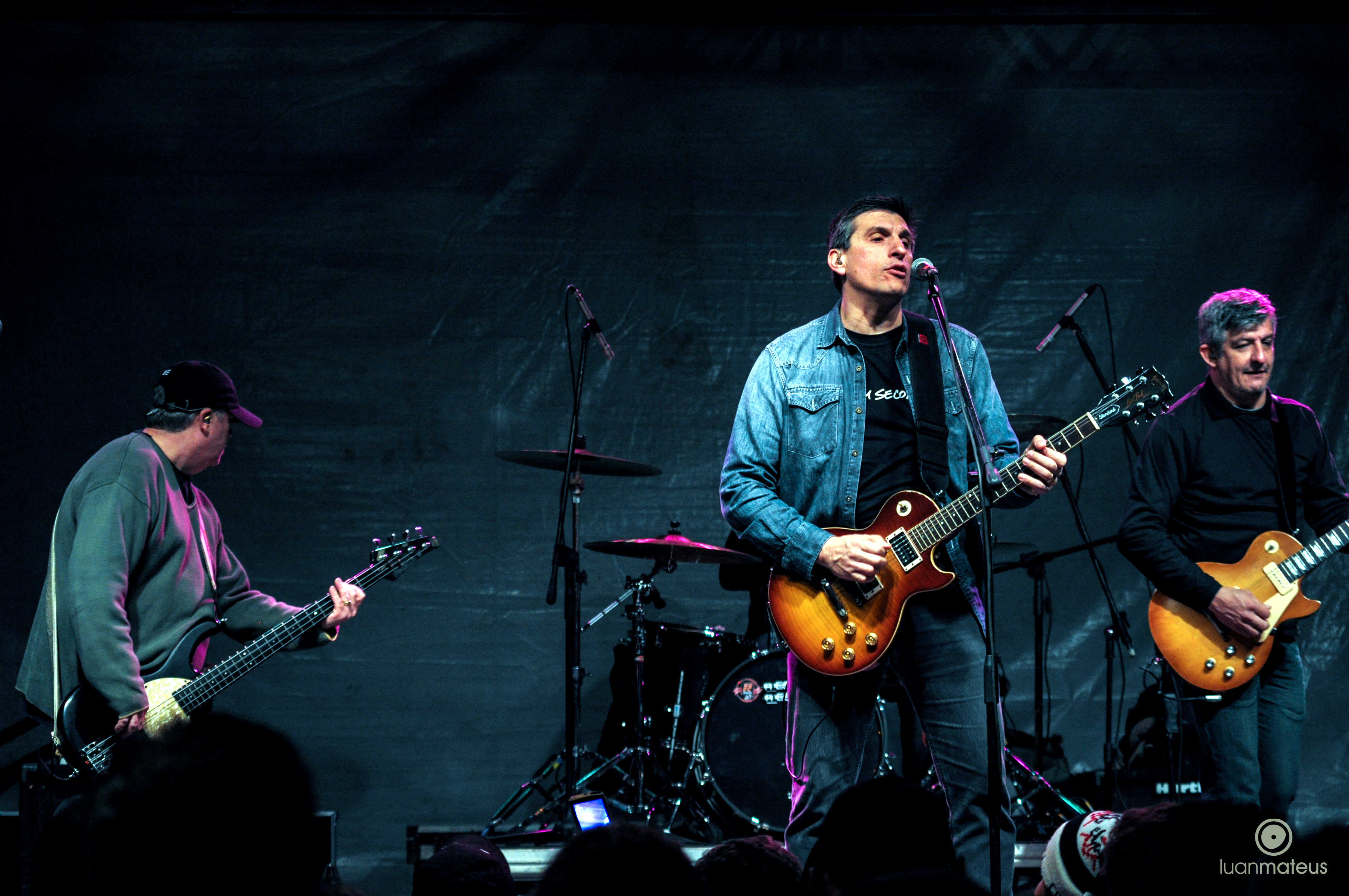 Integrantes da banda Resgate em show de 2013.